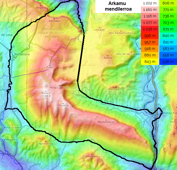 Arkamu mendilerroaren mapa topografikoa.